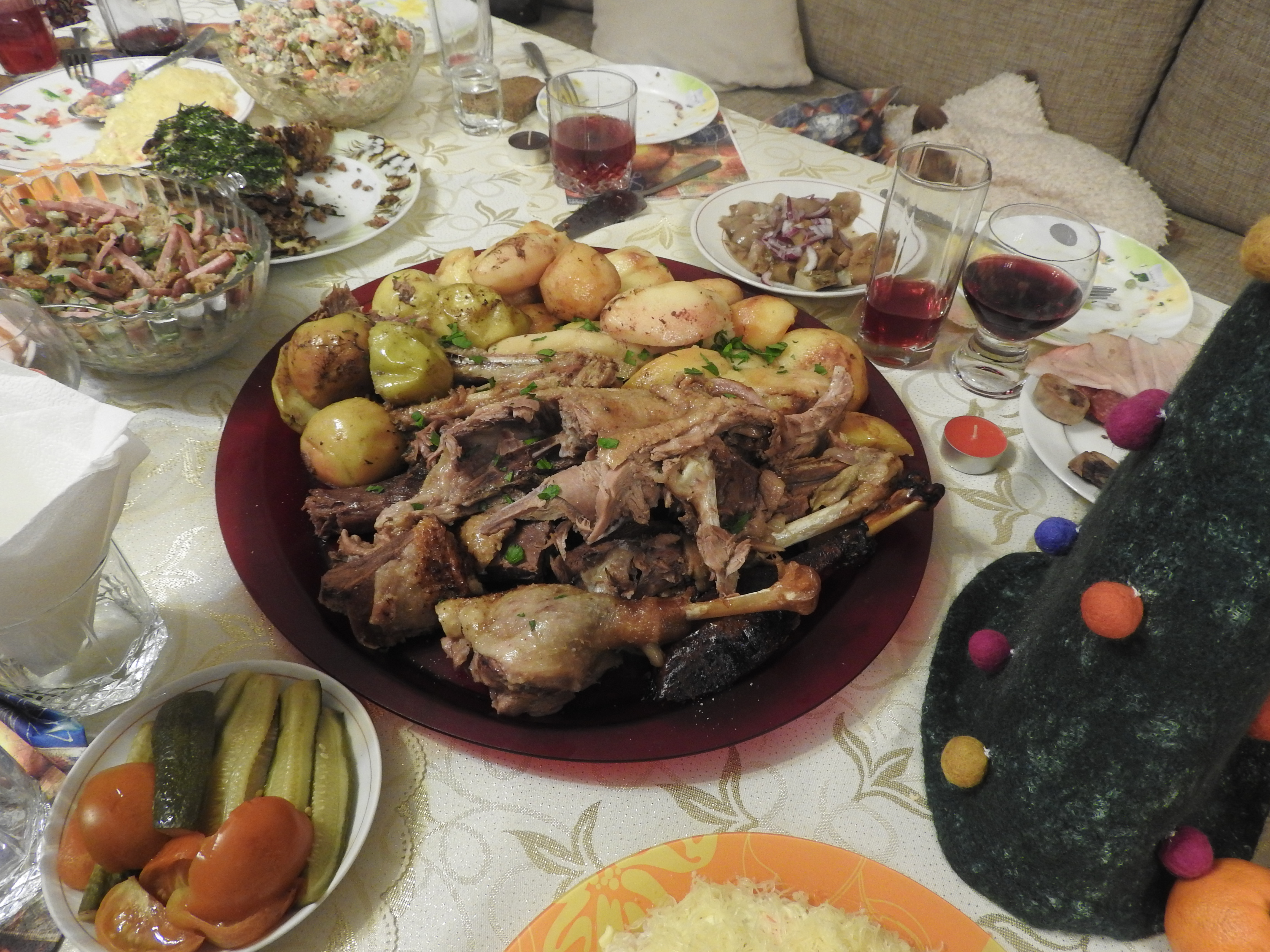 Башҡортса: Ҡаҙ ите